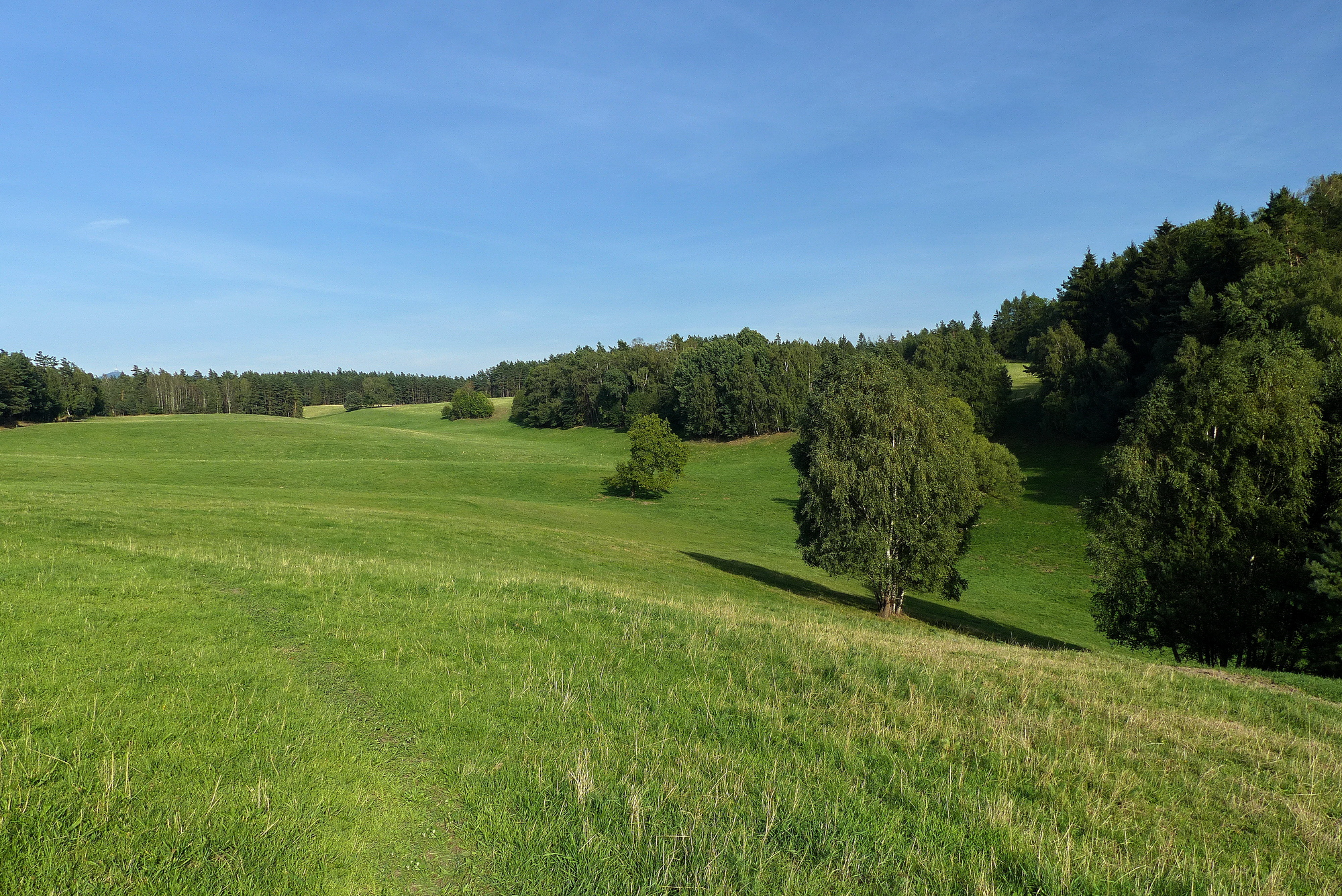 Bývalá Černá Novina, v dáli Ještěd